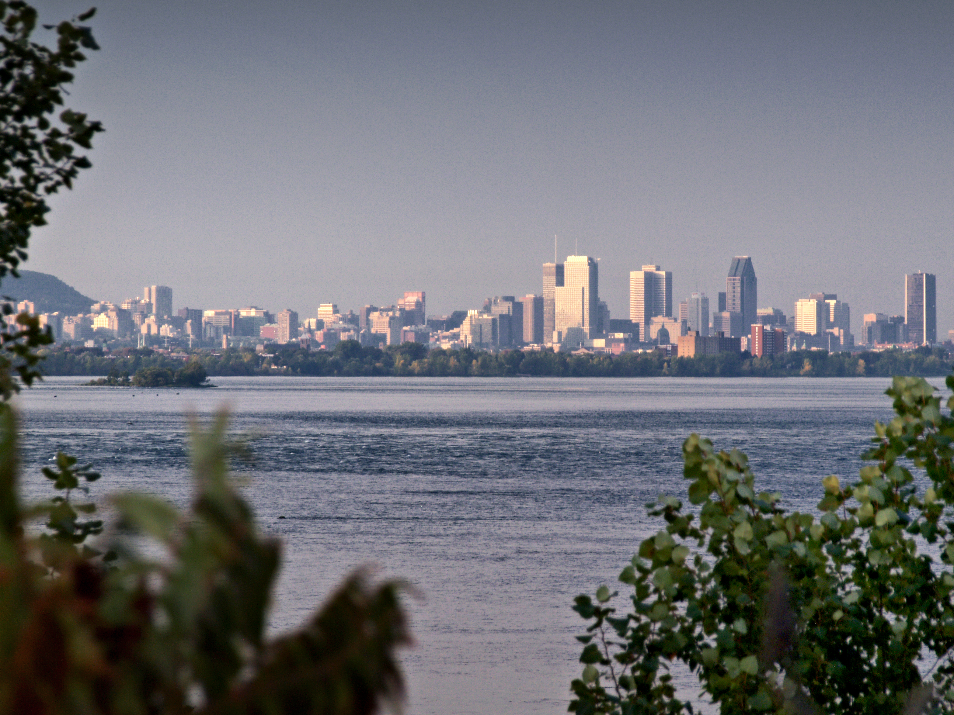 Sainte_Catherine (Québec) - Vue de Montréal et des rapides du fleuve Saint-Laurent